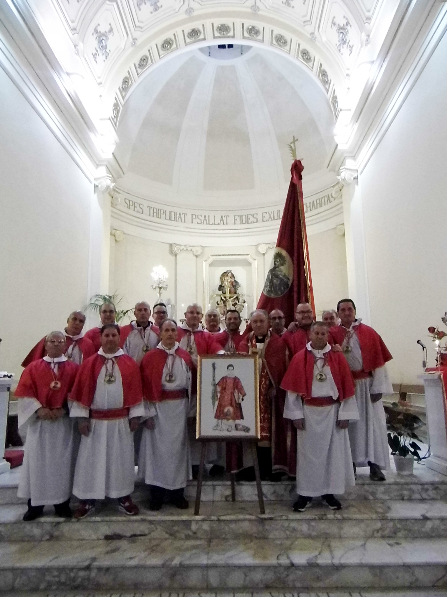 I portatori della Statua argentea di San Cesario diacono e martire, Parrocchia Santa Maria delle Grazie in San Cesario di Lecce (Foto Alessio Marenaci).